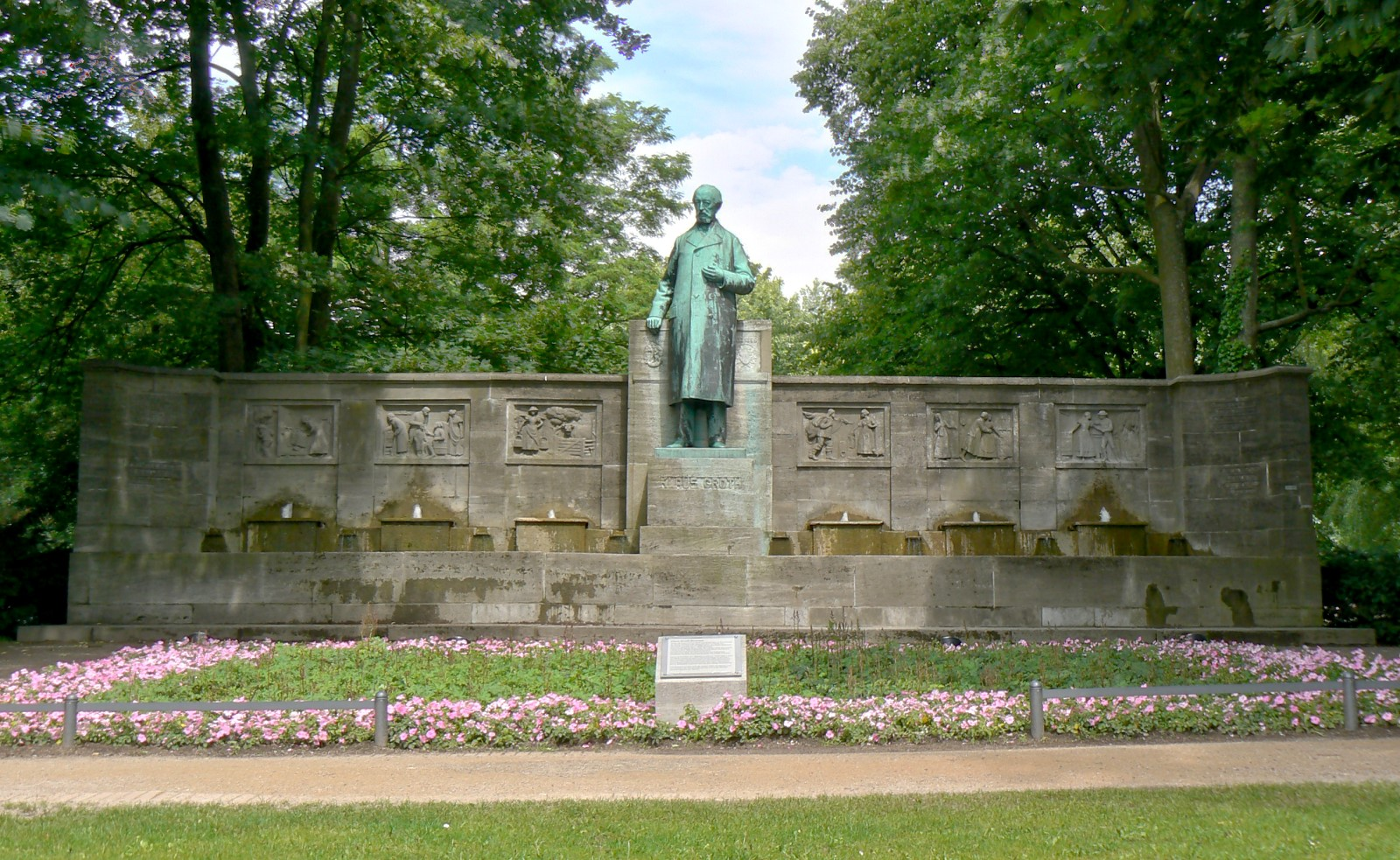 Klaus Groth Brunnen von Heinrich Mißfeldt (1912). Standort: Ratsdienergarten von Kiel. Der Brunnen zeigt Szenen und Verse aus bekannten Gedichten Groths sowie die Wappen von Heide und Kiel.